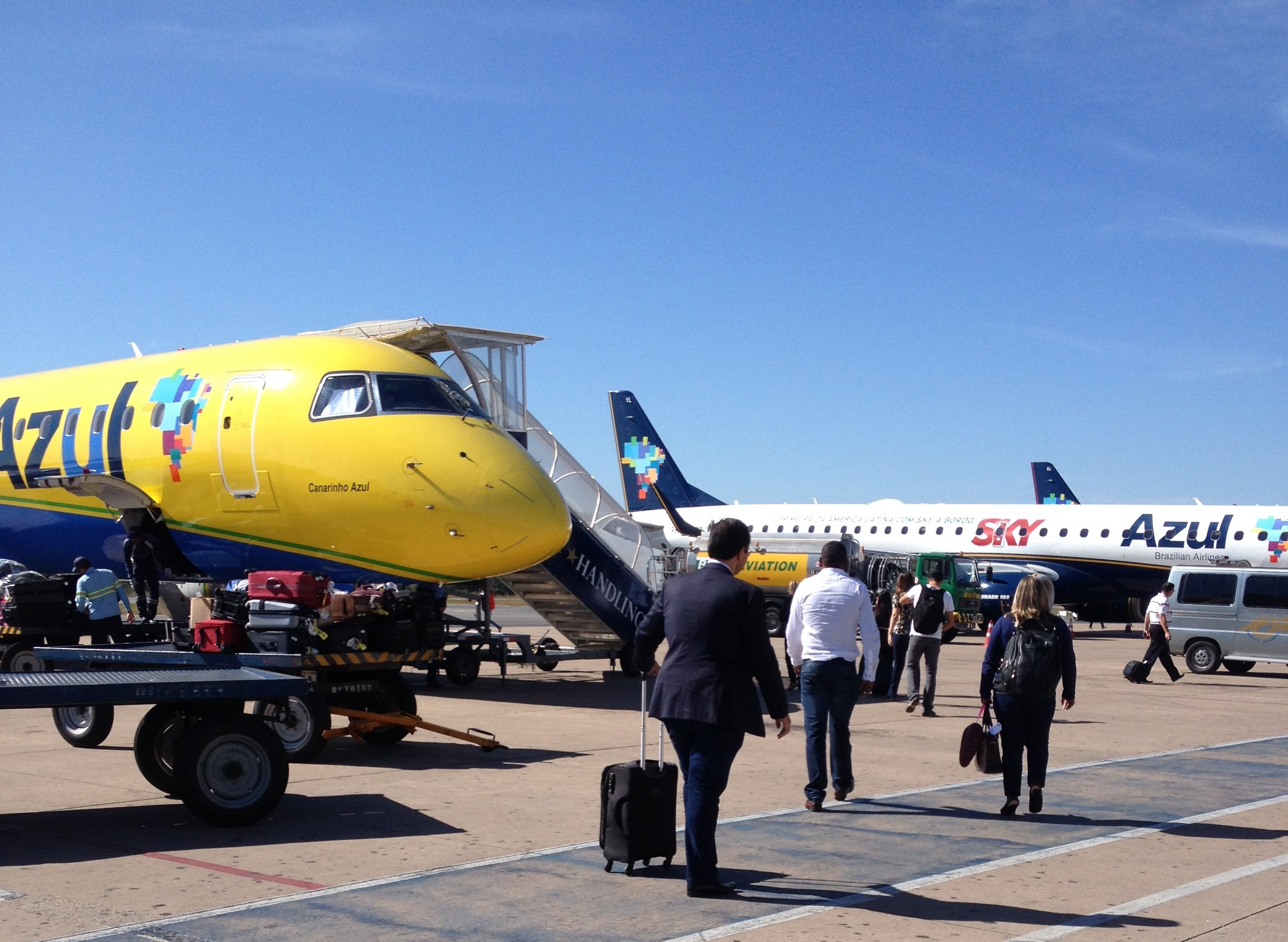 Aeroporto Internacional Marechal Rondon em Cuiabá, Mato Grosso.